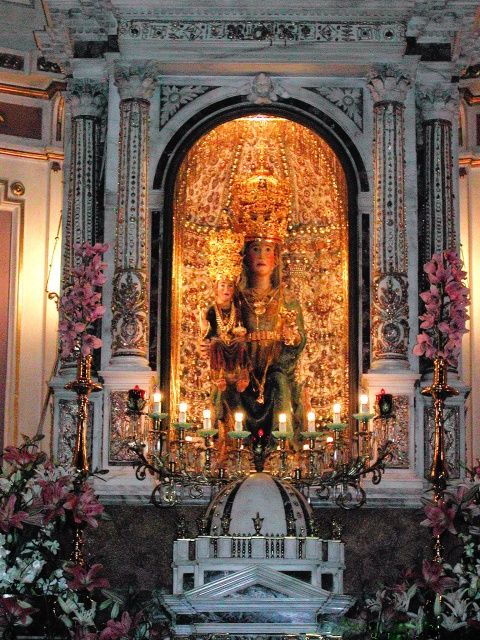 Fontanarosa (AV), Festa del Carro di Paglia 2003